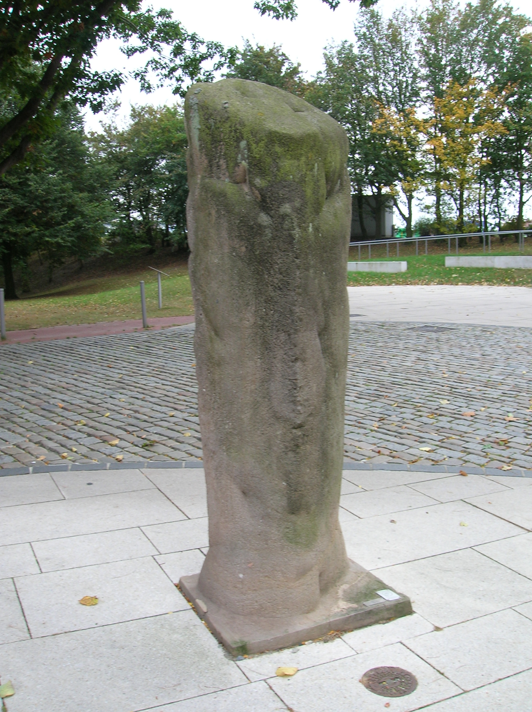 Stele von Thomas Kaufhold zum Bildhauer-Symposion in Bremerhaven im Juli/August 1989; Ecke Deichstraße/Bürgermeister-Smidt-Straße